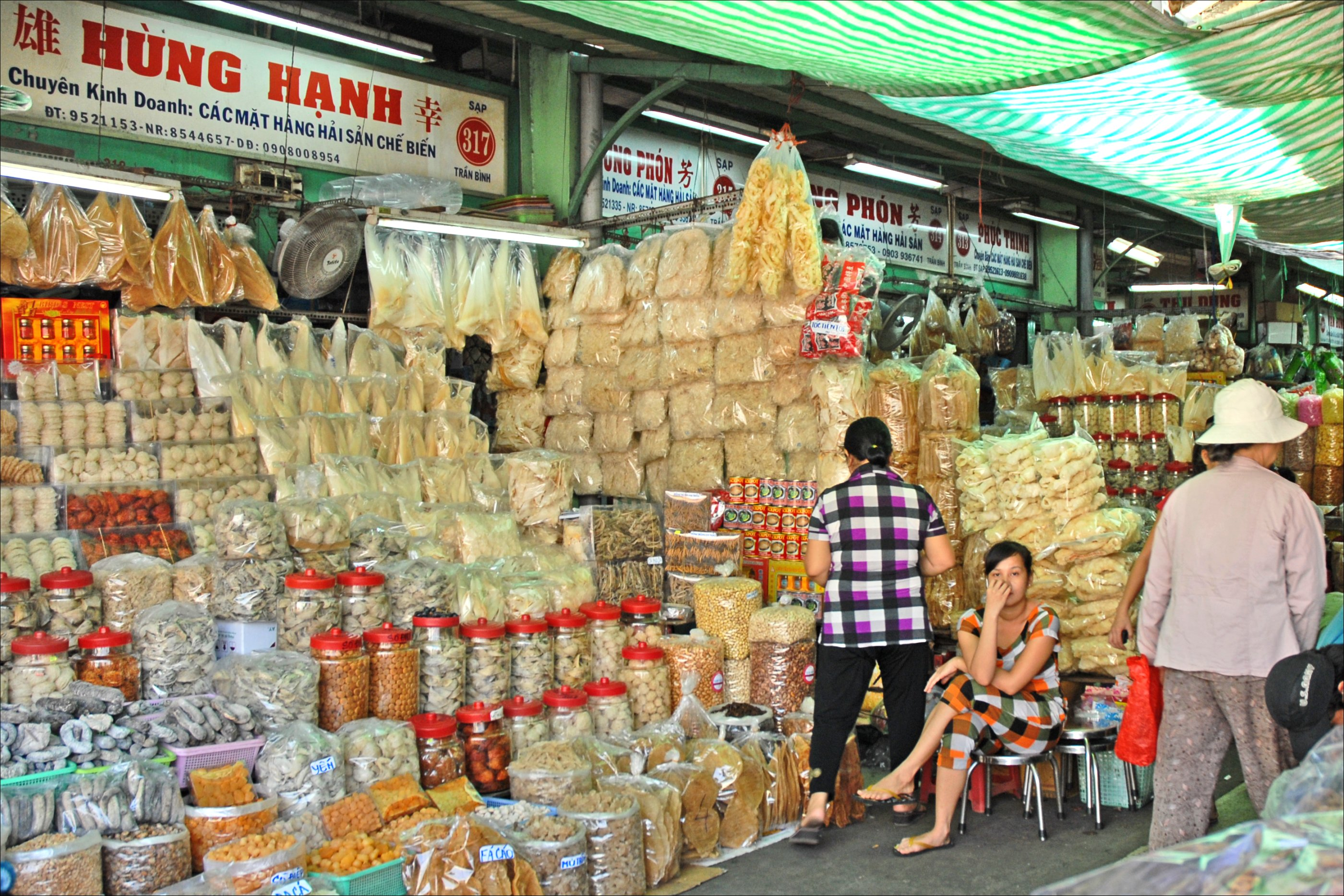 Le marché de Binh Thay a été fondé en 1930 par un négociant chinois dans le quartier commerçant de Cho Lon. Les marchands sont regroupés par secteur. Il y règne une activité intense et les touristes doivent rester discrets. Sur la photo, un magasin de produits de luxe utilisés également en médecine chinoise.